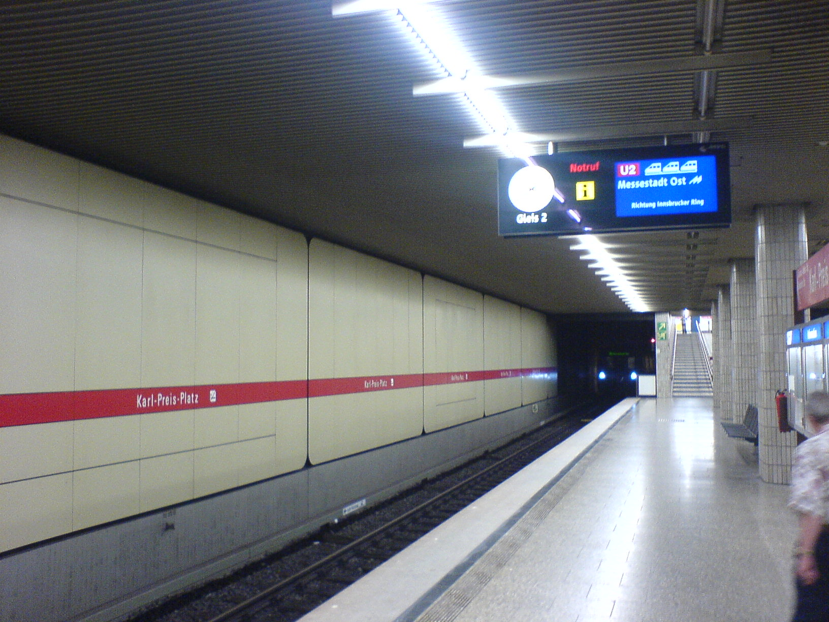 U-Bahn-Station Karl-Preis-Platz (München), Bahn kommt vom Haltepunkt Giesing.